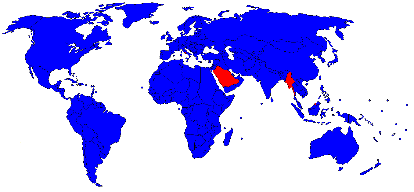 carte des démocraties auto-définies